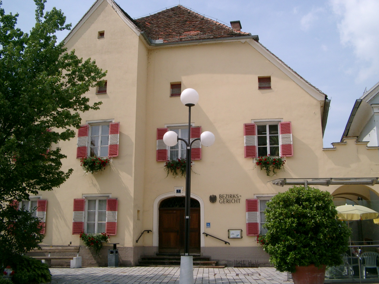 Bezirksgericht, ehem. Rathaus